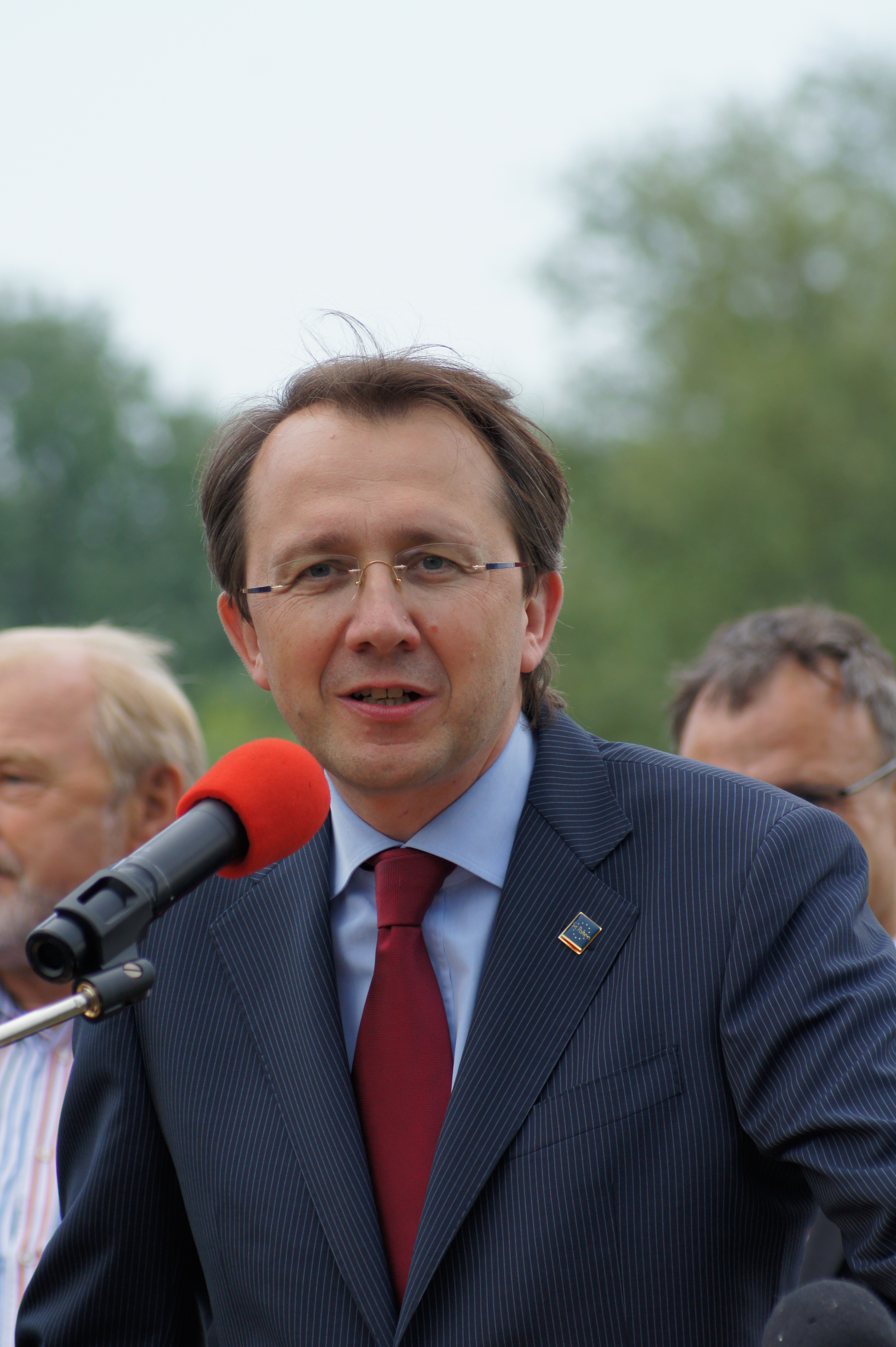 Der Bürgermeister der Stadt St. Pölten Matthias Stadler bei der Eröffnung des neuen Stattersdorfer Steges, genannt "Lions Steg"